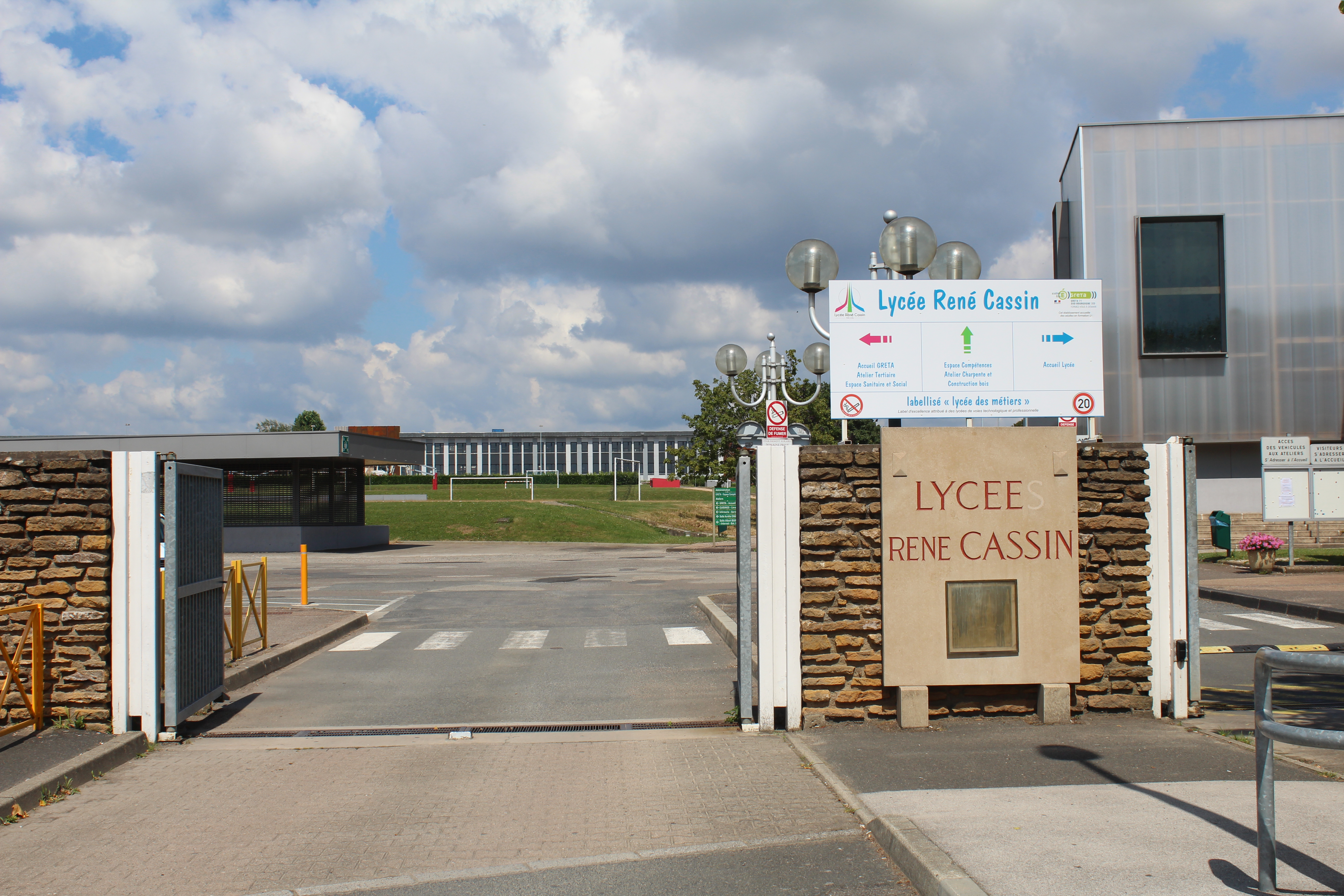 Entrée du lycée René Cassin de Mâcon.